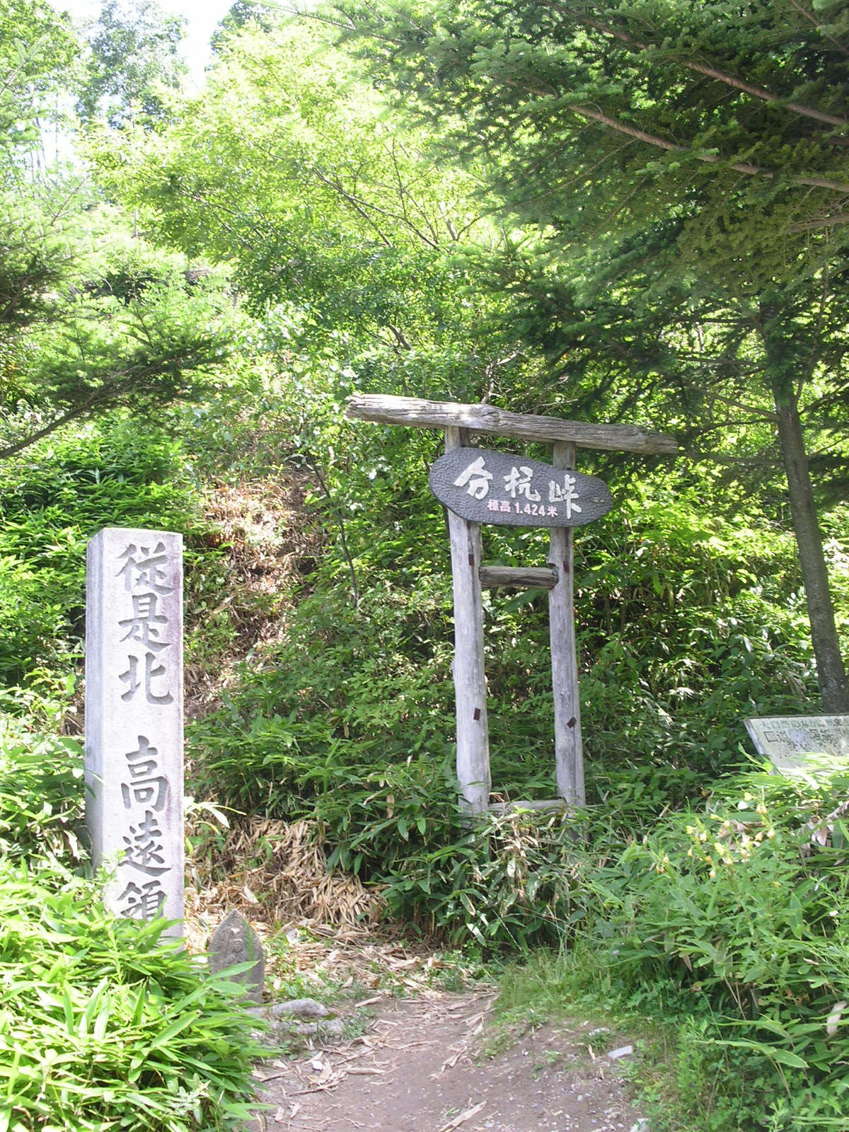 分杭峠石碑